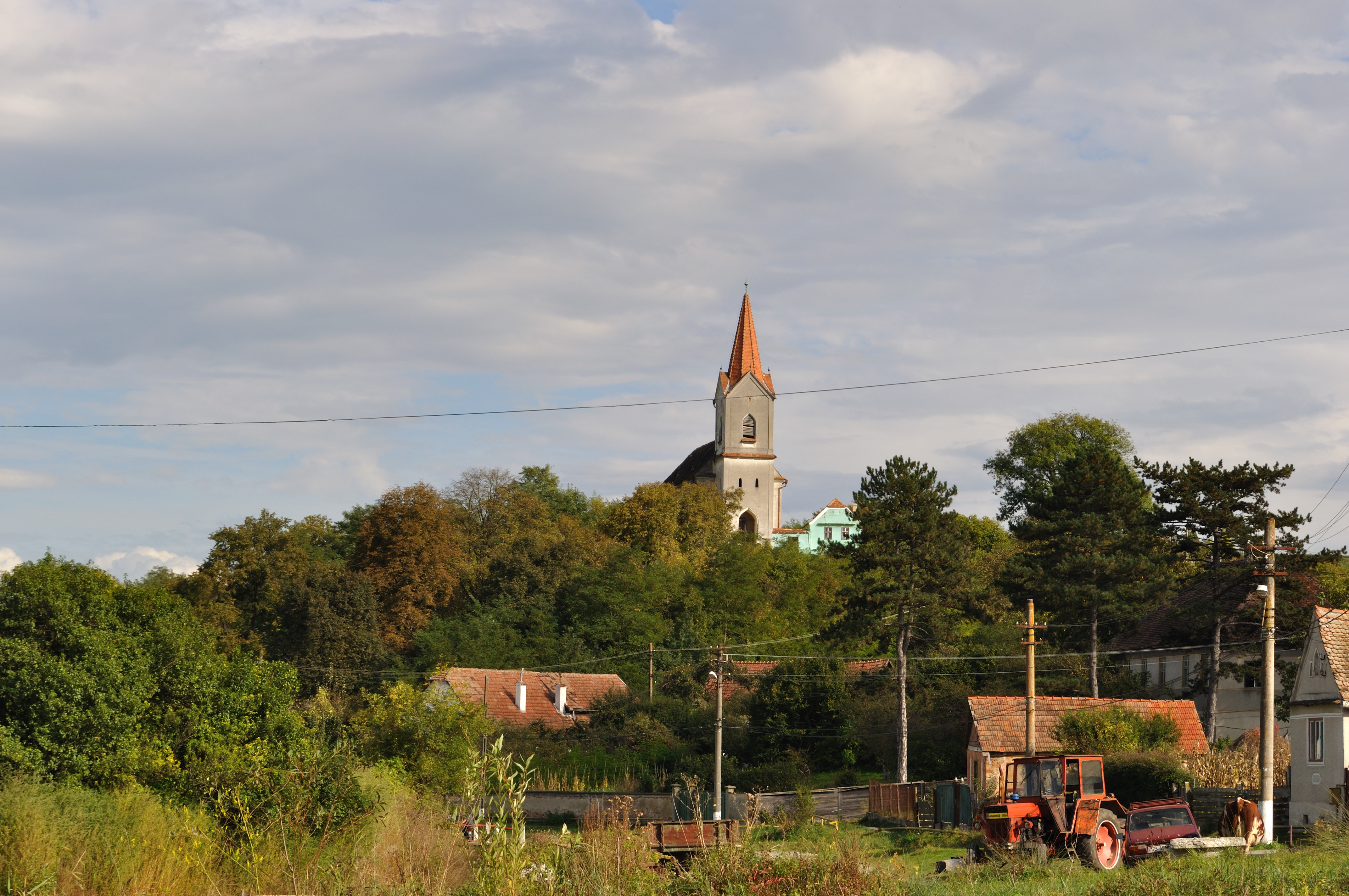 Biserica reformată din Hașag, județul Sibiu